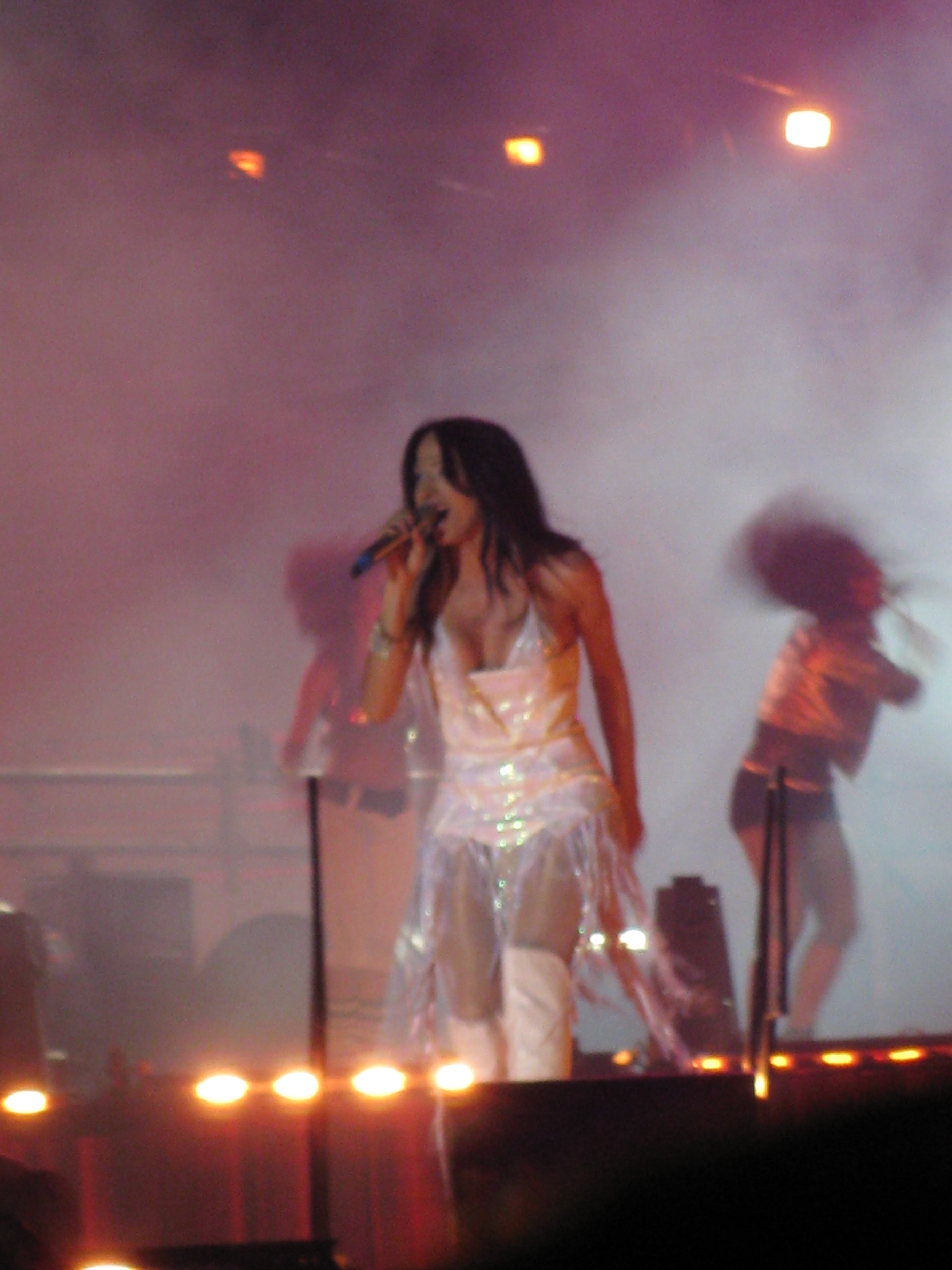 Tel Aviv 100th anniversary opening celebration in Rabin Square דנה אינטרנשיונל- אירוע הפתיחה לחגיגות המאה לתל אביב